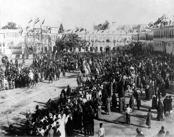 الإمبراطور الألماني غليوم الثاني في ساحة المرجة